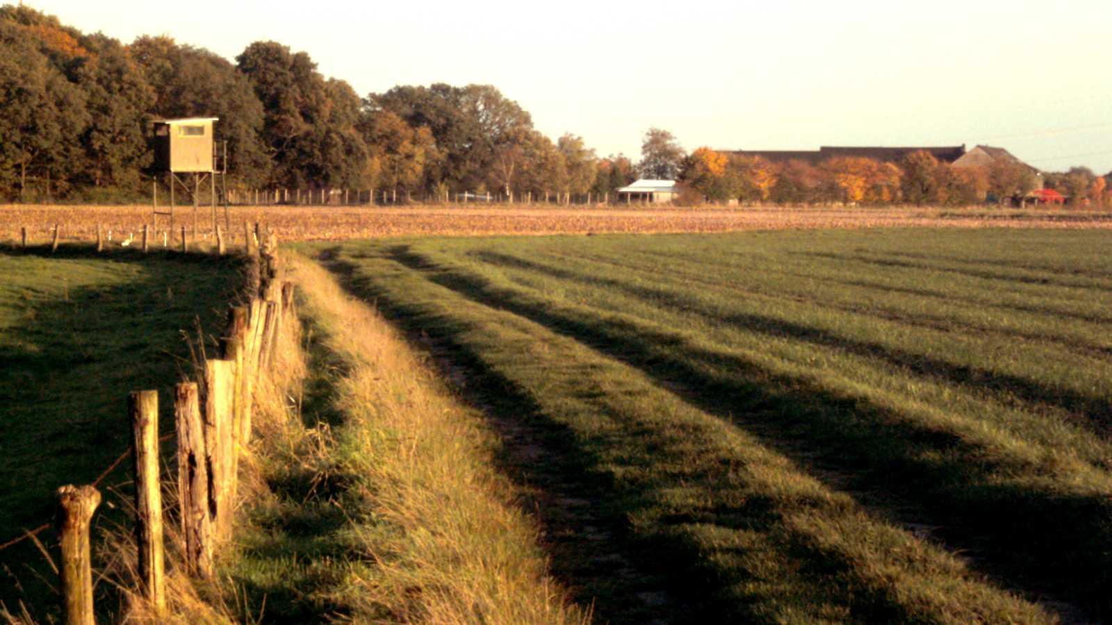 Der Feldweg „Hohe Straße“ in Tönisvorst-Hochbend im nordrhein-westfälischen Kreis Viersen.